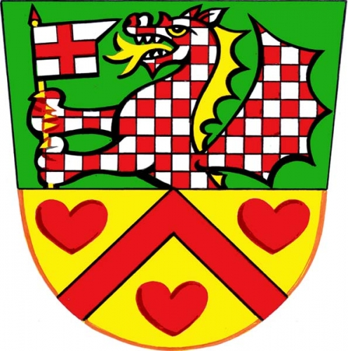 znak,Jiřice u Moravských Budějovic , okres Znojmo